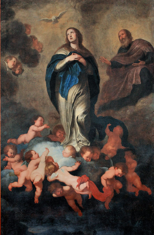 Immacolata Concezione, di Geronimo Gerardi (Guilliam Walsgart), 1631, olio su tela, Palermo, chiesa di S. Anna la Misericordia